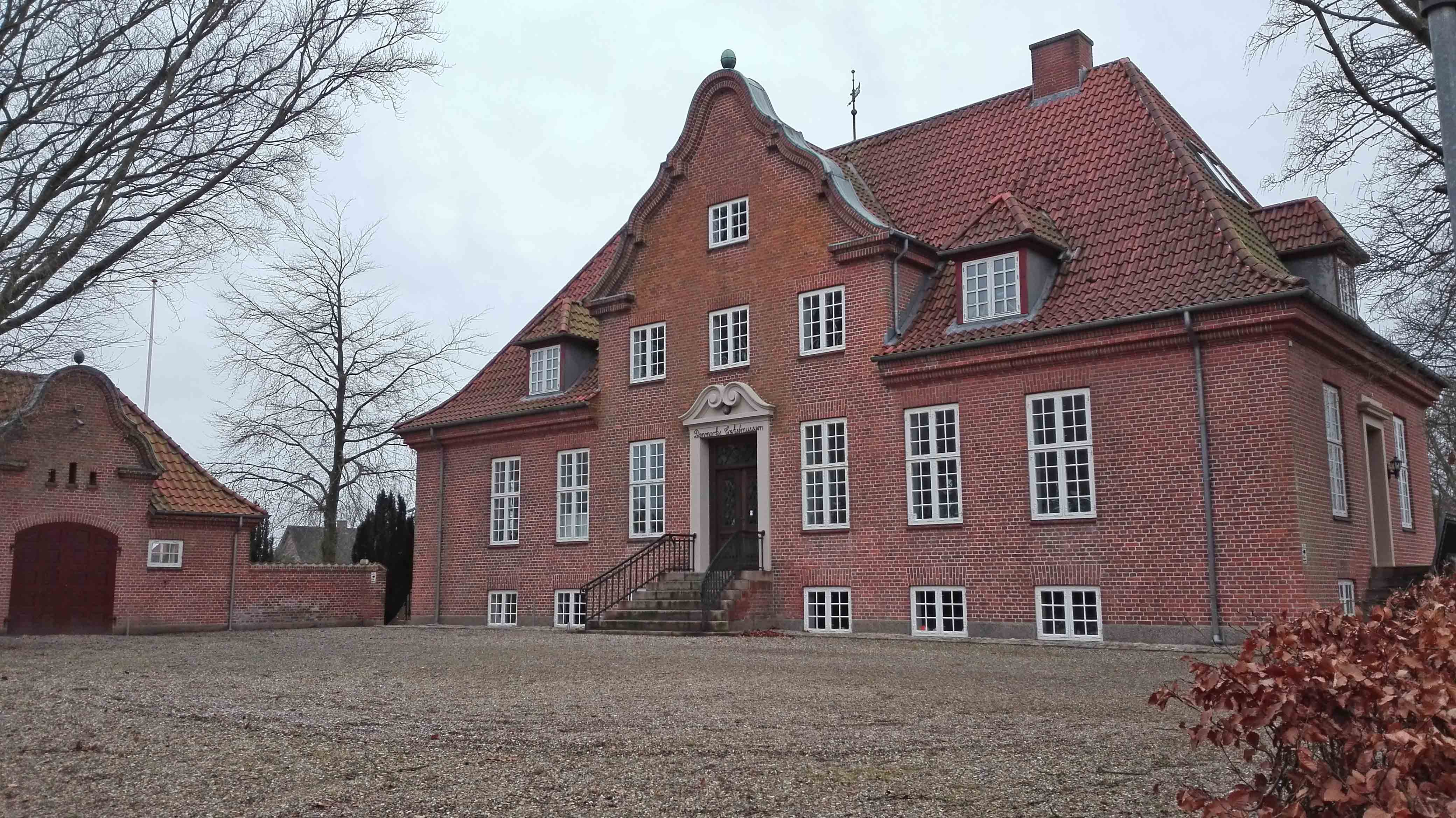 Aalestrup Cykelmuseum fra nordøst